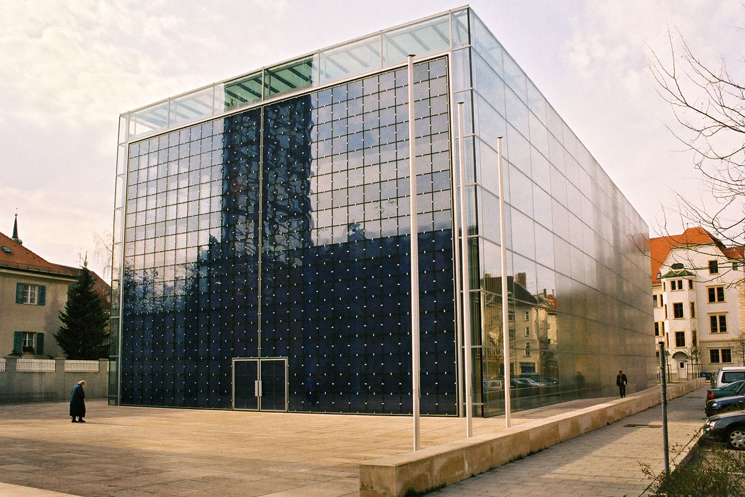 Herz-Jesu-Kirche (Sacred Heart Church), Munich Main building